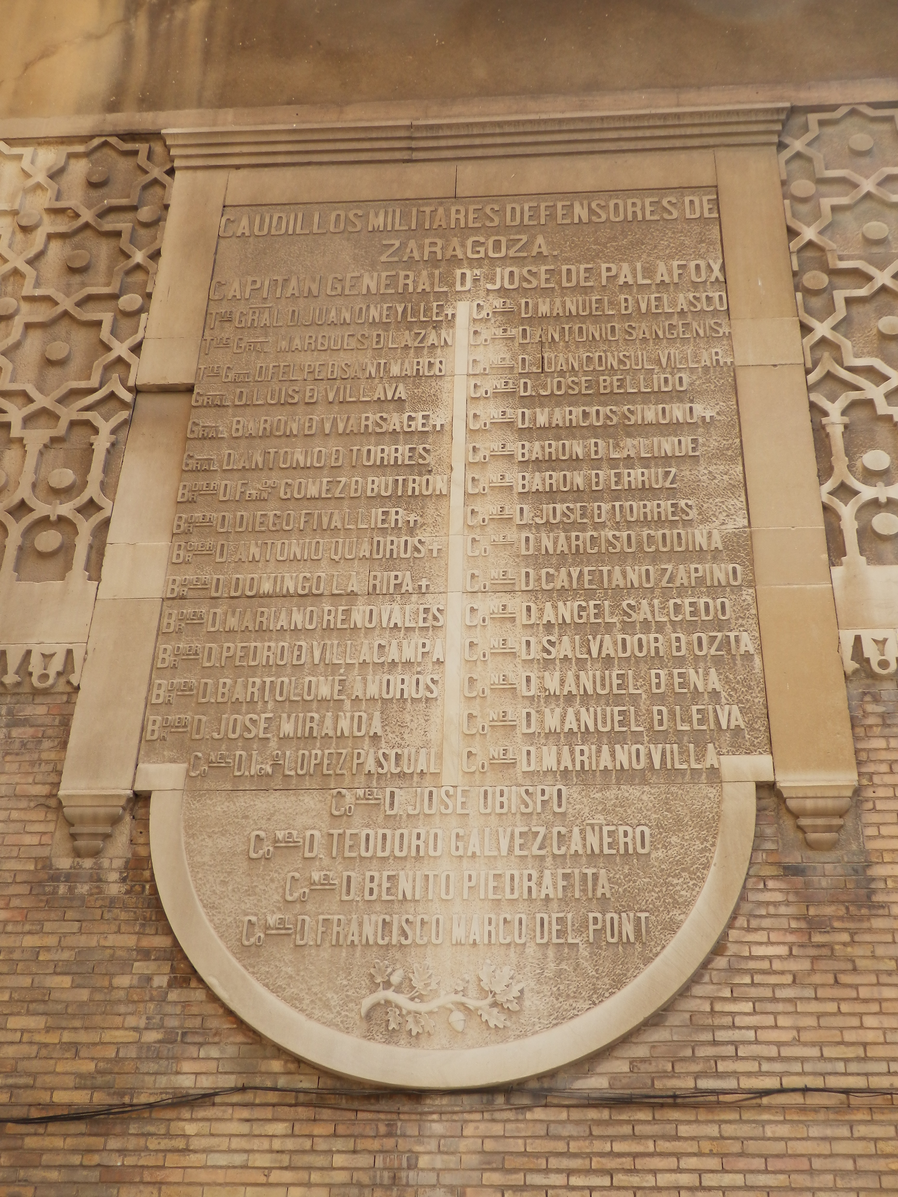 Antigua Escuela de Artes y Oficios de Zaragoza. Reconocimiento a los militares defensores de Zaragoza en los Sitios.